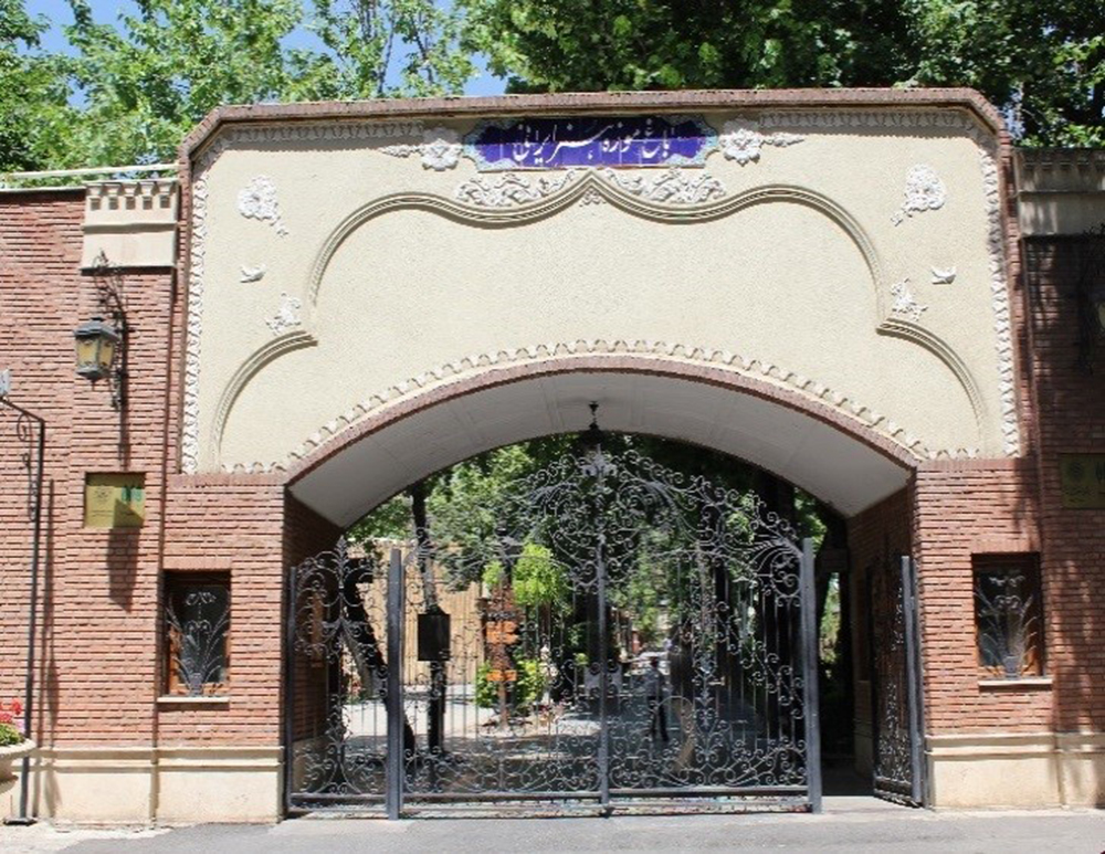 Gate of Iranian Art Museum